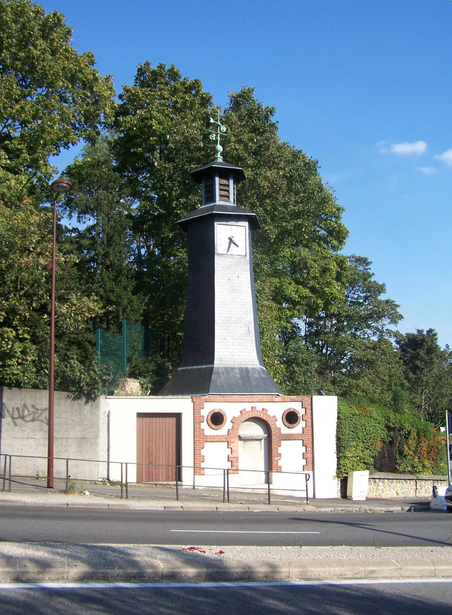 Horloge de Rocquencourt (Yvelines, France)